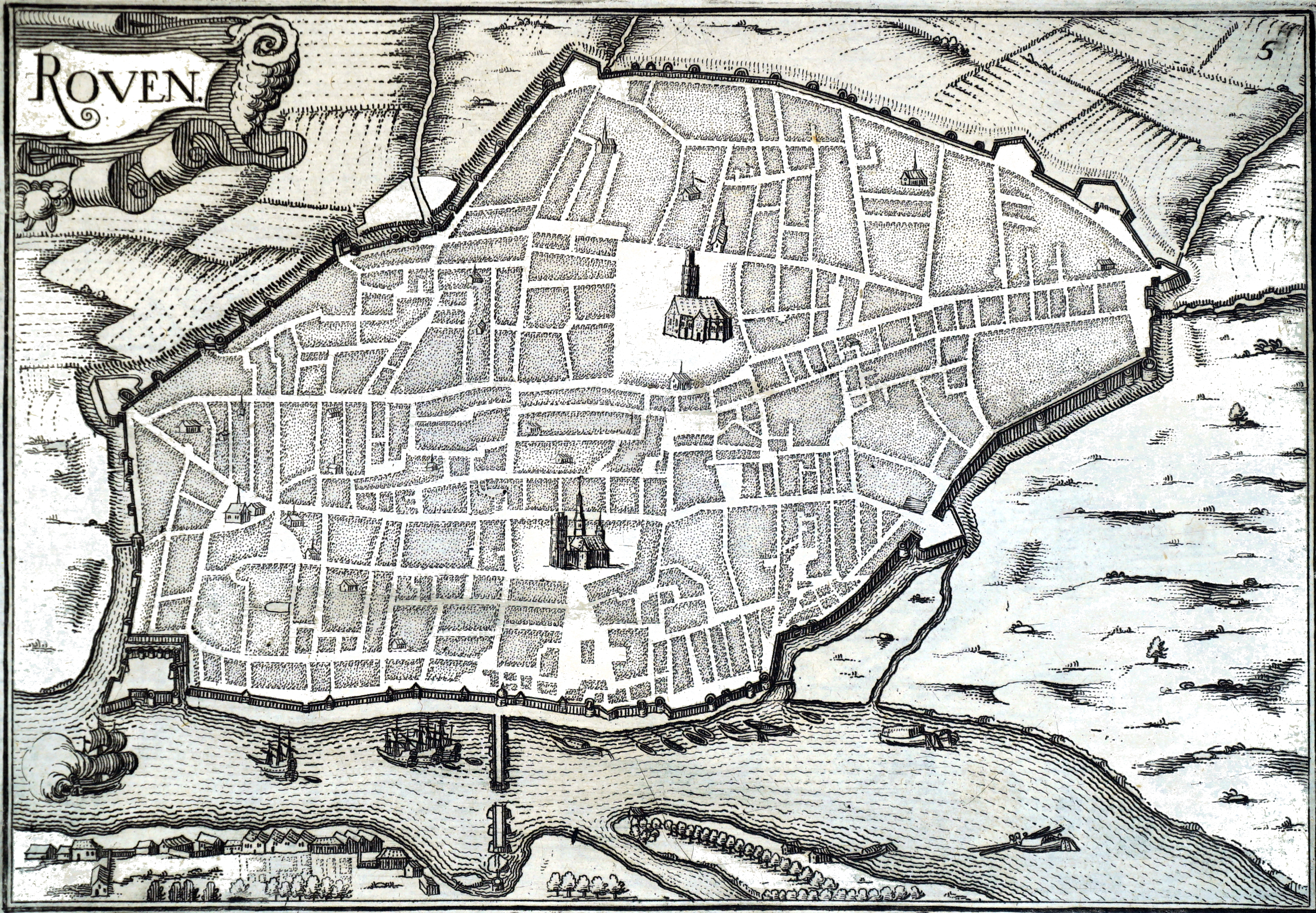 sur un dessin de Tassin dans Plans et profils...'.